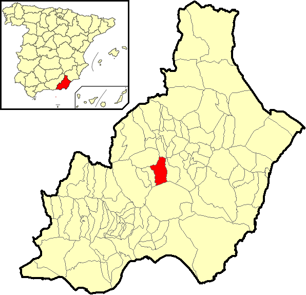 Situación del término municipal de Velefique respecto a la provincia de Almería, en España.